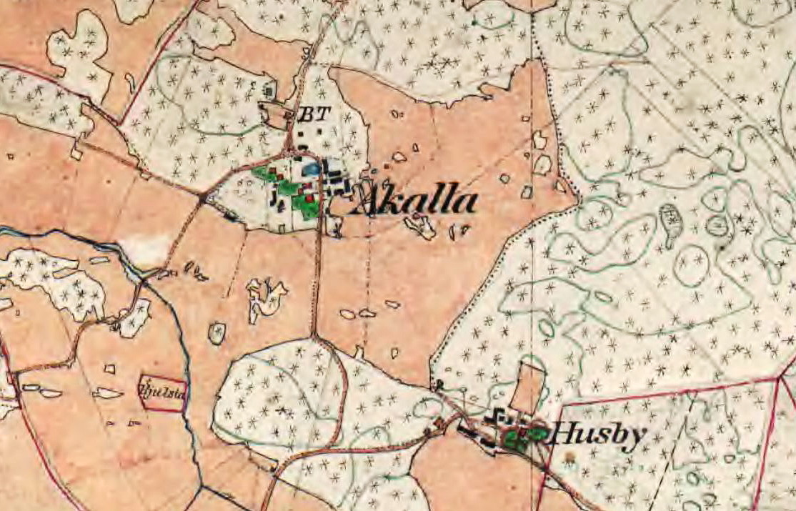 Häradsekonomiska kartan visande Akalla by